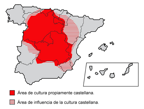 Mapa de representación aproximada del área de cultura castellana. Aunque otras zonas, sean propiamente dicha de origen castellano, éstas convergen en un conjunto de derivados dialectales y distintas hablas. Que aún manteniendo una similitud lingüística, difieren en la idiosincrasia, derivando en identidades propias. Como podría ser el caso del sur de la actual Extremadura y prácticamente la totalidad de Andalucía. Puede comprobarse otras representaciones sobre las áreas de influencia del castellano y de otras lenguas. La diversidad lingüística en España Idiomas de España